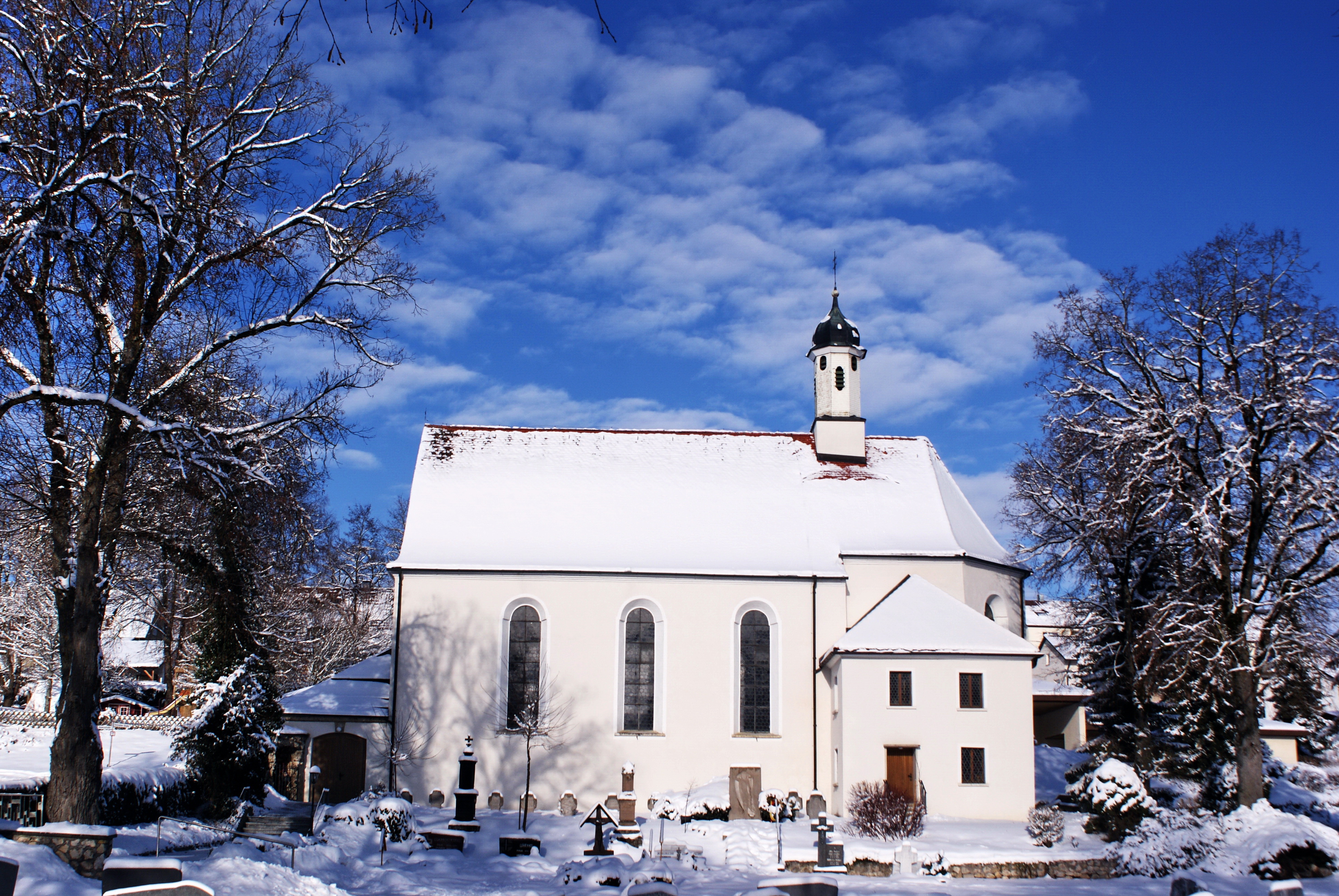 Wallfahrtskirche Maria Deutstetten in Veringenstadt. Die Kirche wurde 1753 eingeweiht. an gleicher Stelle Stand bereits vorher eine Kirche. Die Pfarrei Deutstetten ist bis in das Jahr 1241 nachweisbar.